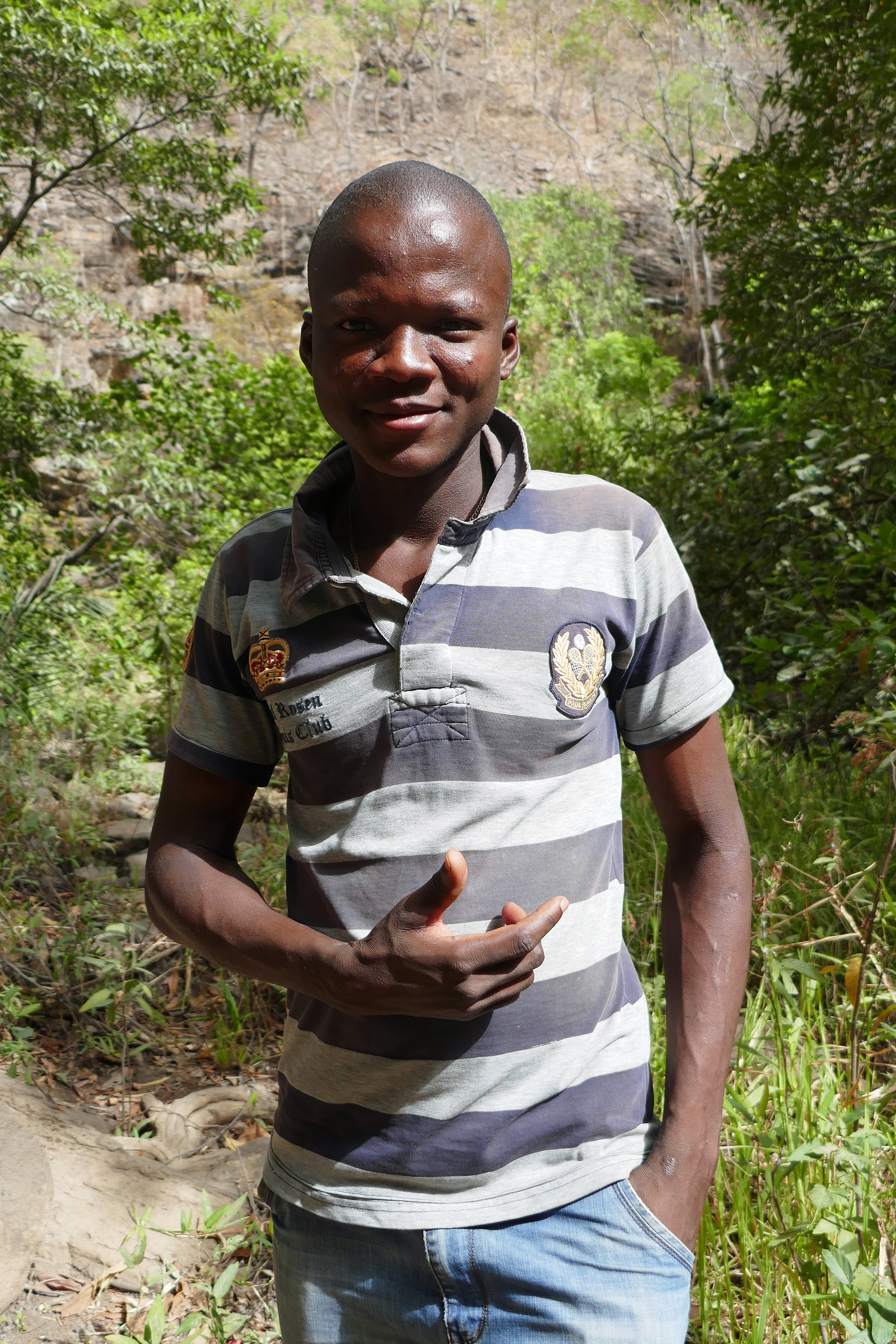 Jeune homme Gourmantché près des chutes de Tanougou (Bénin).